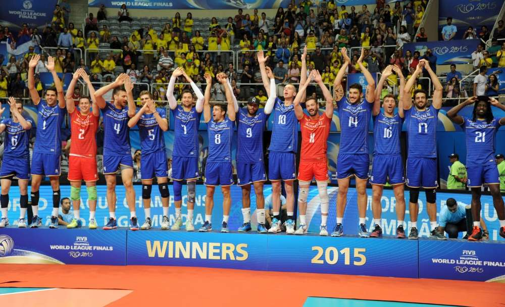 gagnant 2015